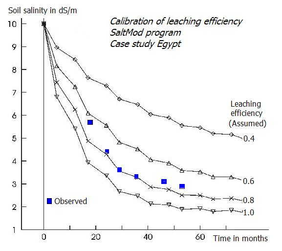 Calibrating leaching of salts from the soil